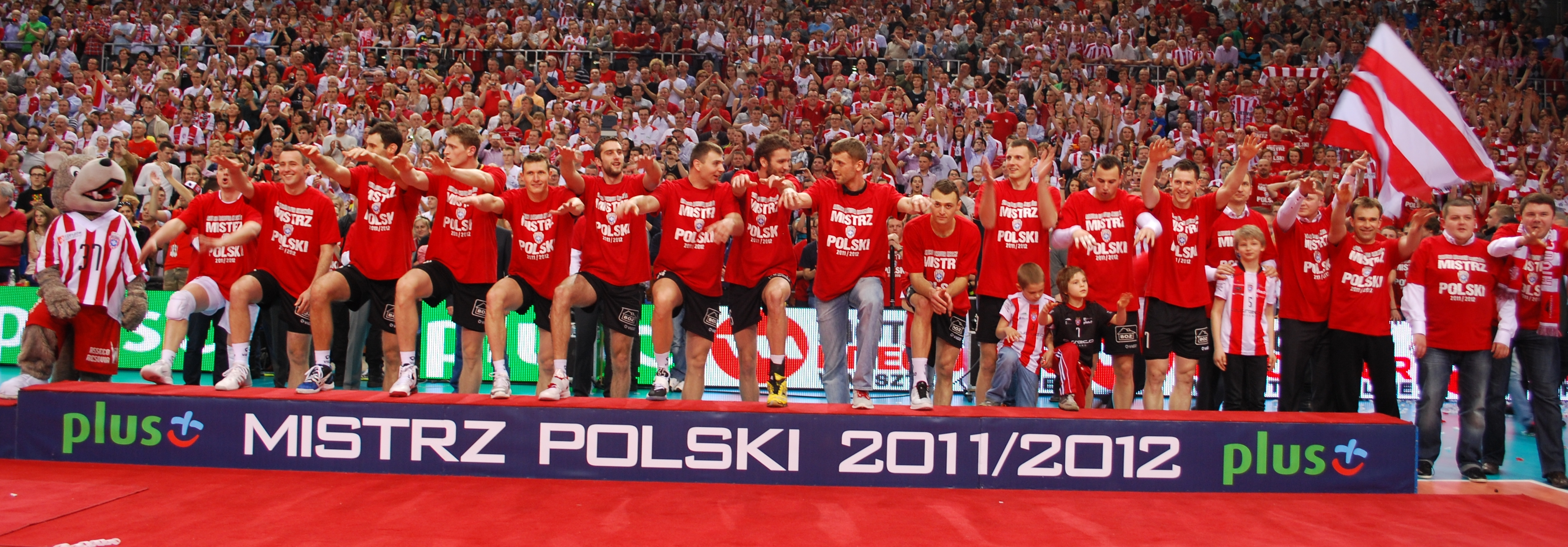 Asseco Resovia Rzeszów Mistrzem Polski. Finał PlusLigi 2011/2012. Rzeszów.